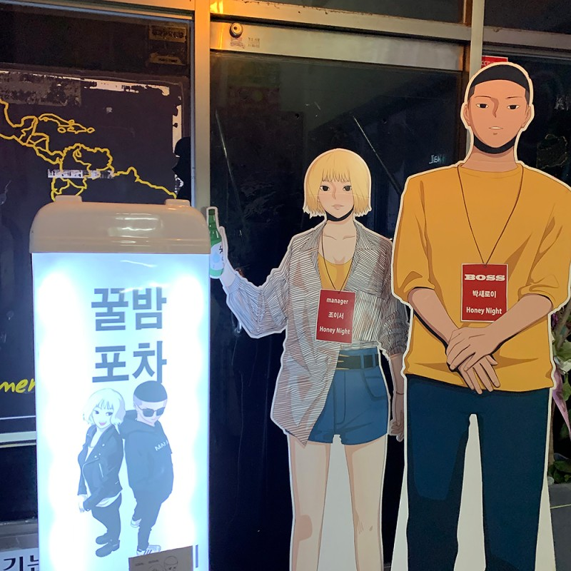 이태원 클라쓰 꿀밤(HONEY NIGHT) 포차